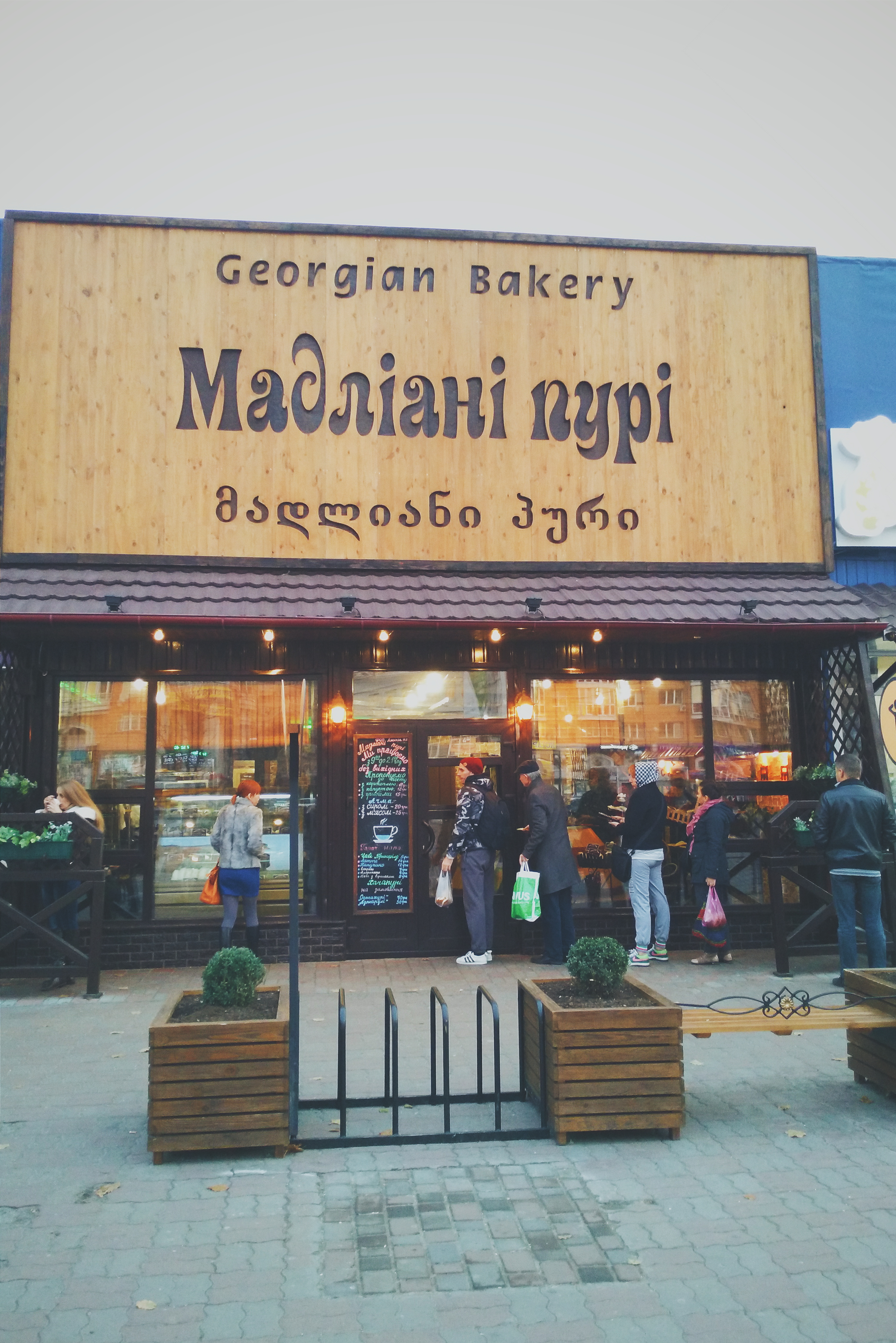 Georgian Madliani Pudi Street Food, Kyiv, UA